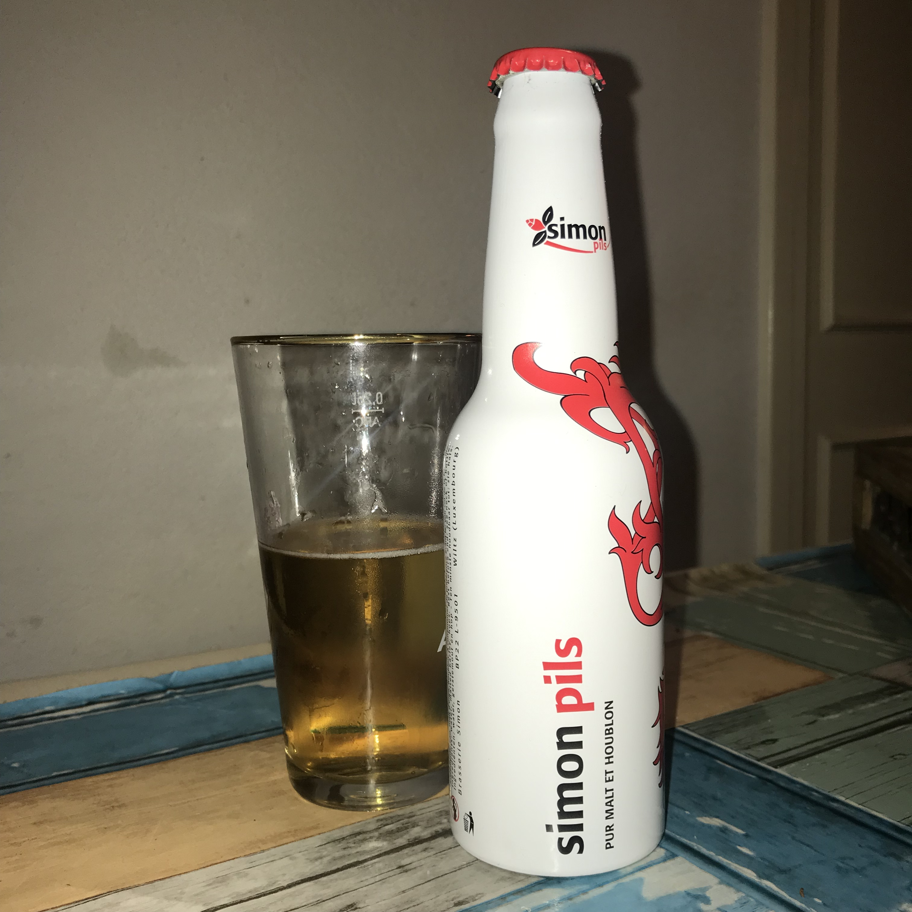 Simon Pils, fles à 330ml